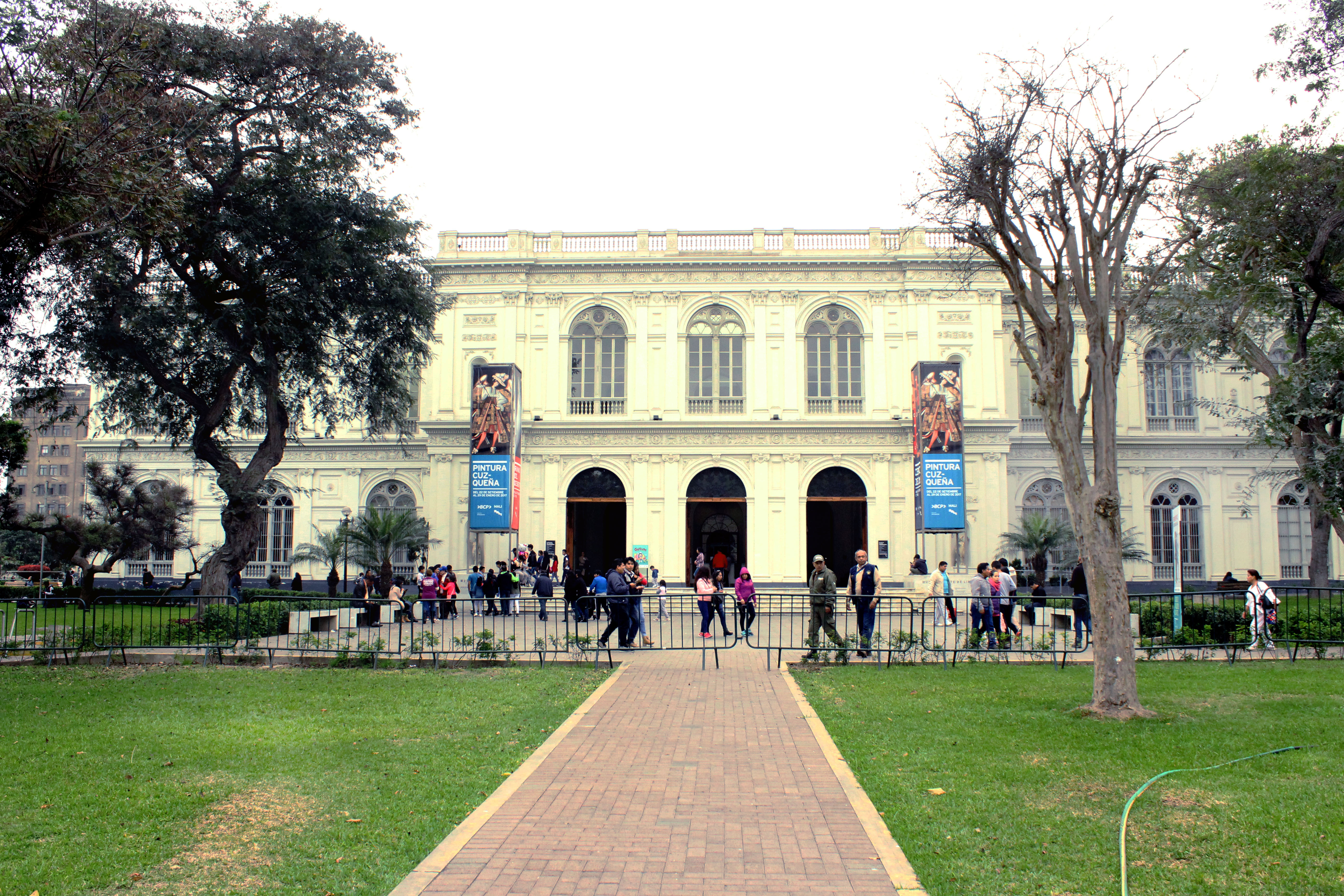 Vista Frontal de la fachada del M.A.L.I.